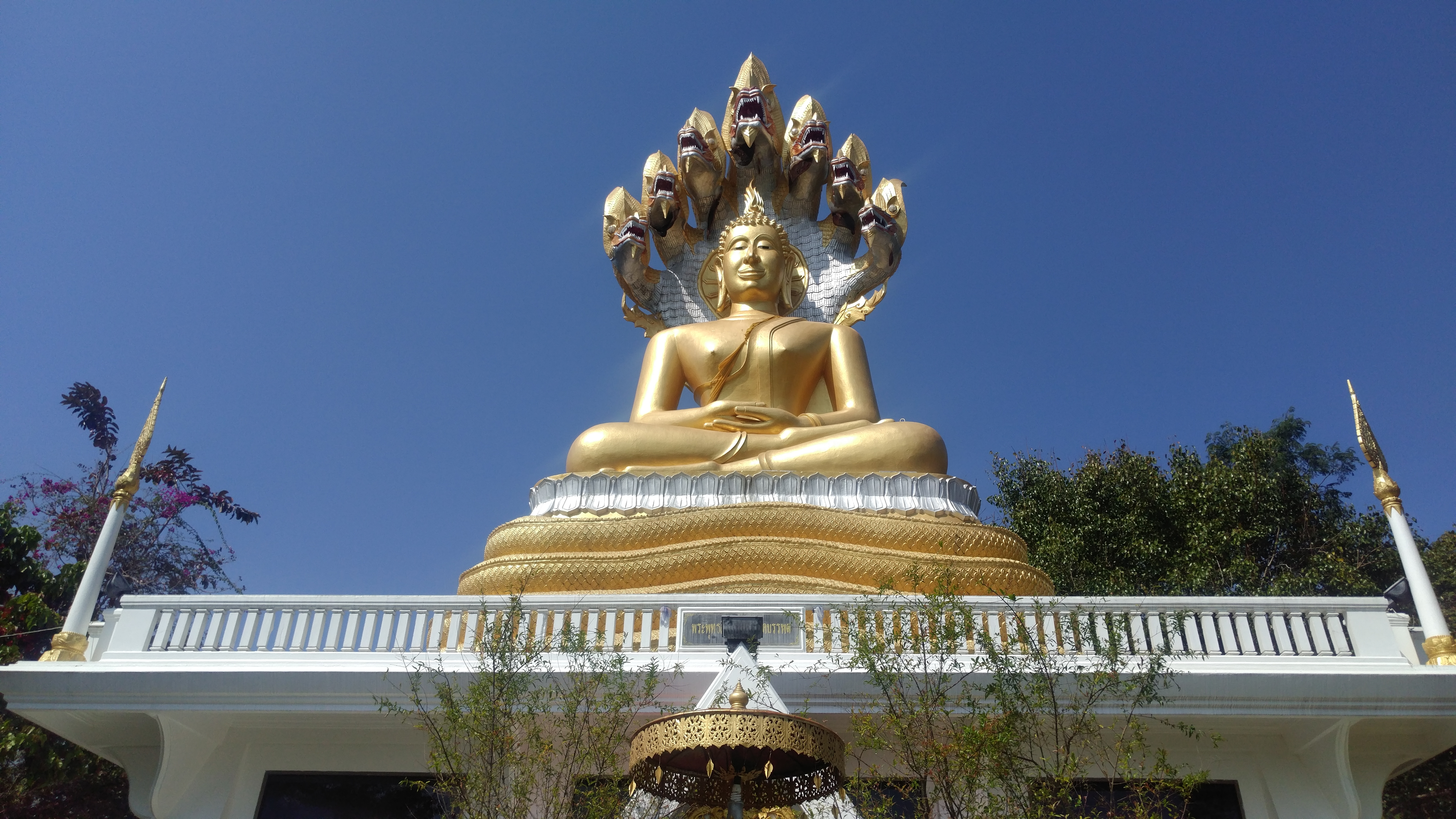 Tempio di Wat Thaton - Buddha protetto da Naga